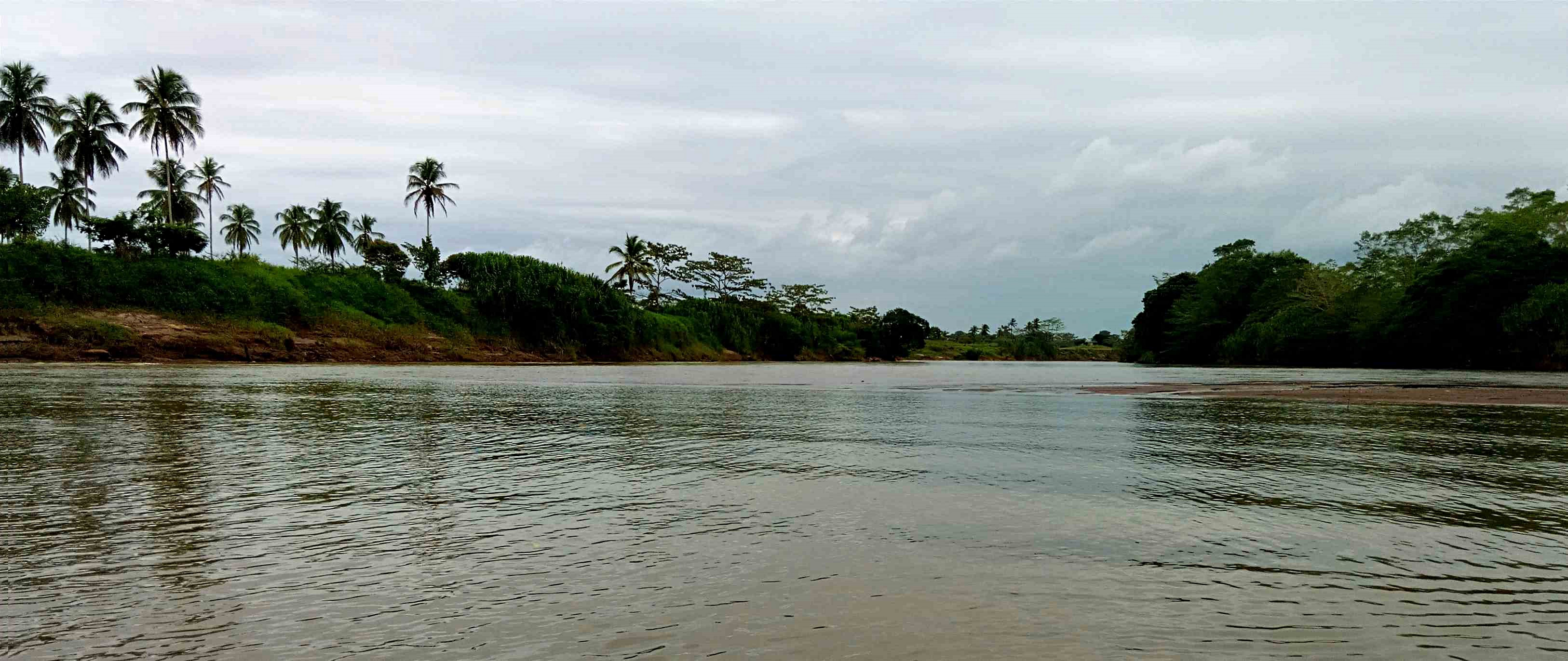 Le Rio Sarapiqui dans sa partie naviguable au nord de Puerto Viejo, Costa Rica.